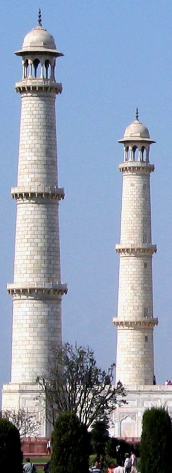 ગુજરાતી: ચારે ખૂણાં પર સ્થિત મીનારા આ દશ્યને ચોકઠામાં બાંધે છે.